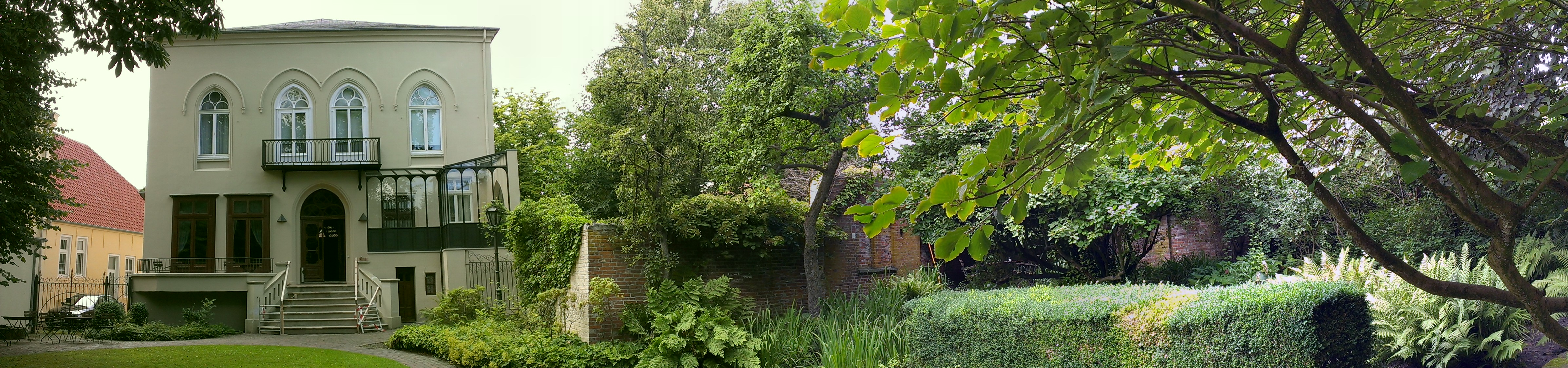 Pano Garten Organeum Weener